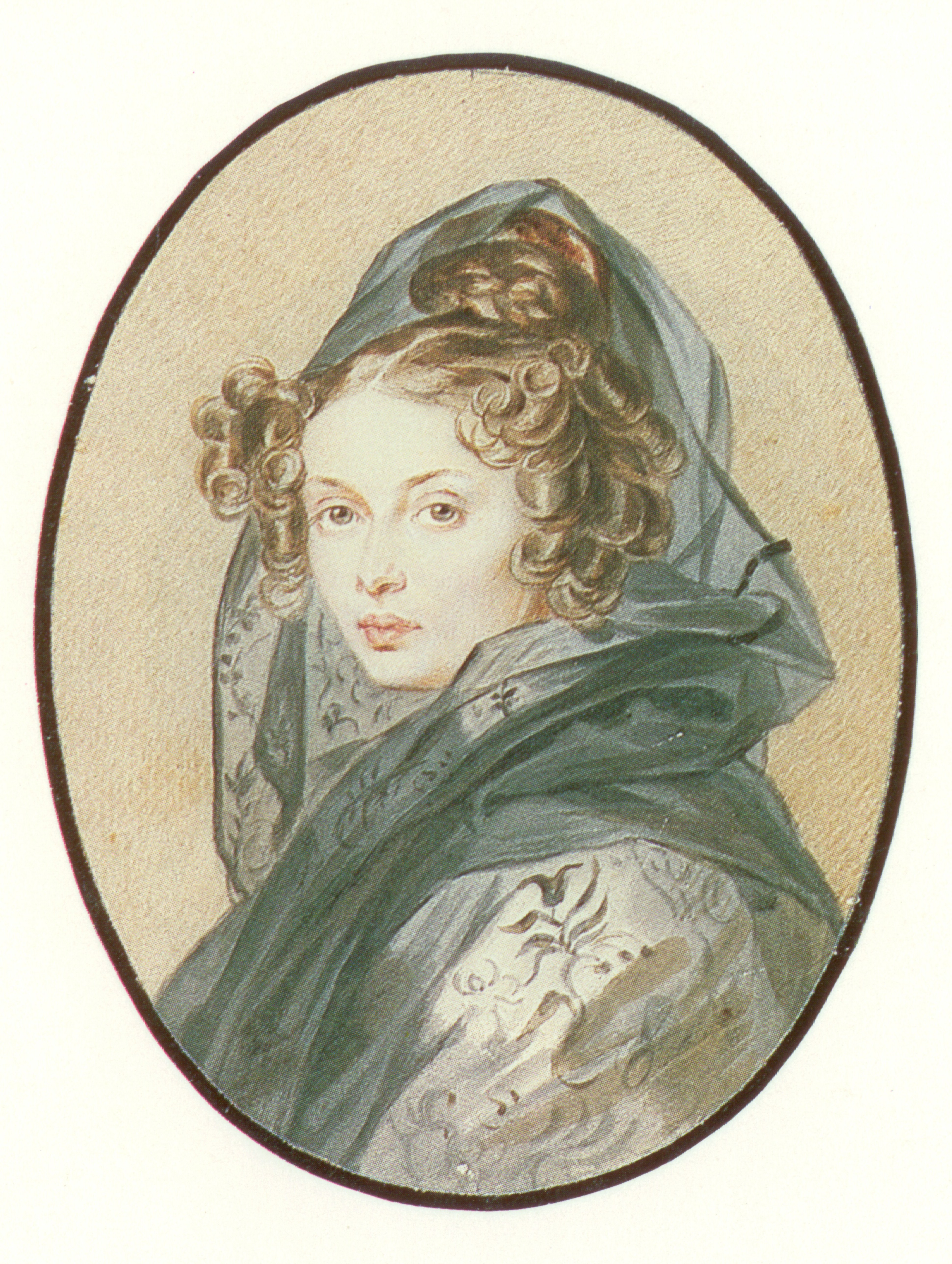 Портрет Александры Григорьевны Муравьёвой (1804-1832)